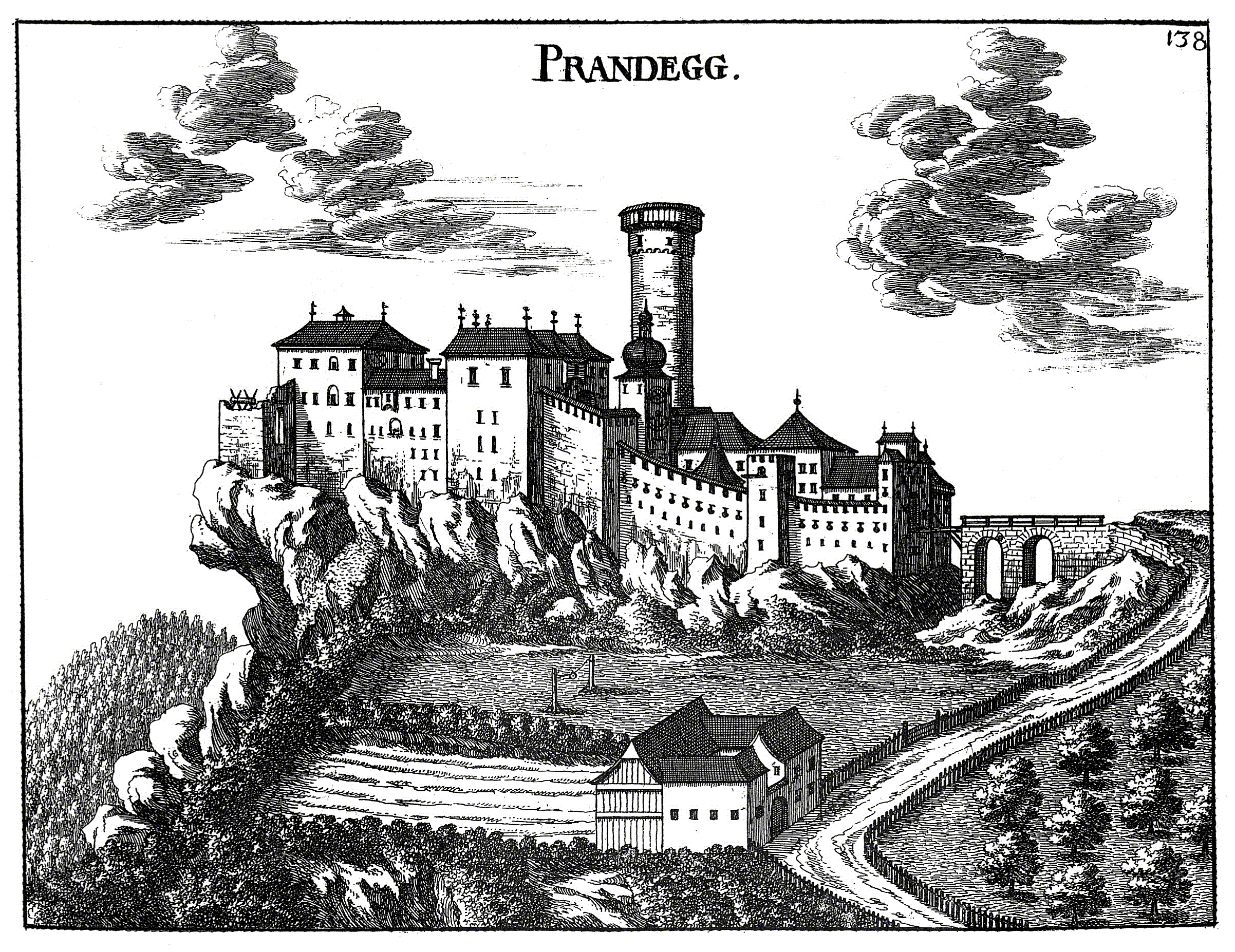 Kupferstich der Burg Prandegg (Burgruine Prandegg)